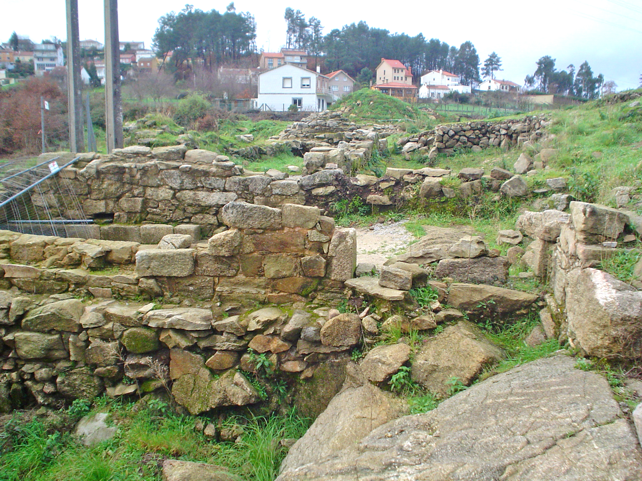 Castelo da Rocha forte. Conxo - Santiago. Muros do interior do recinto